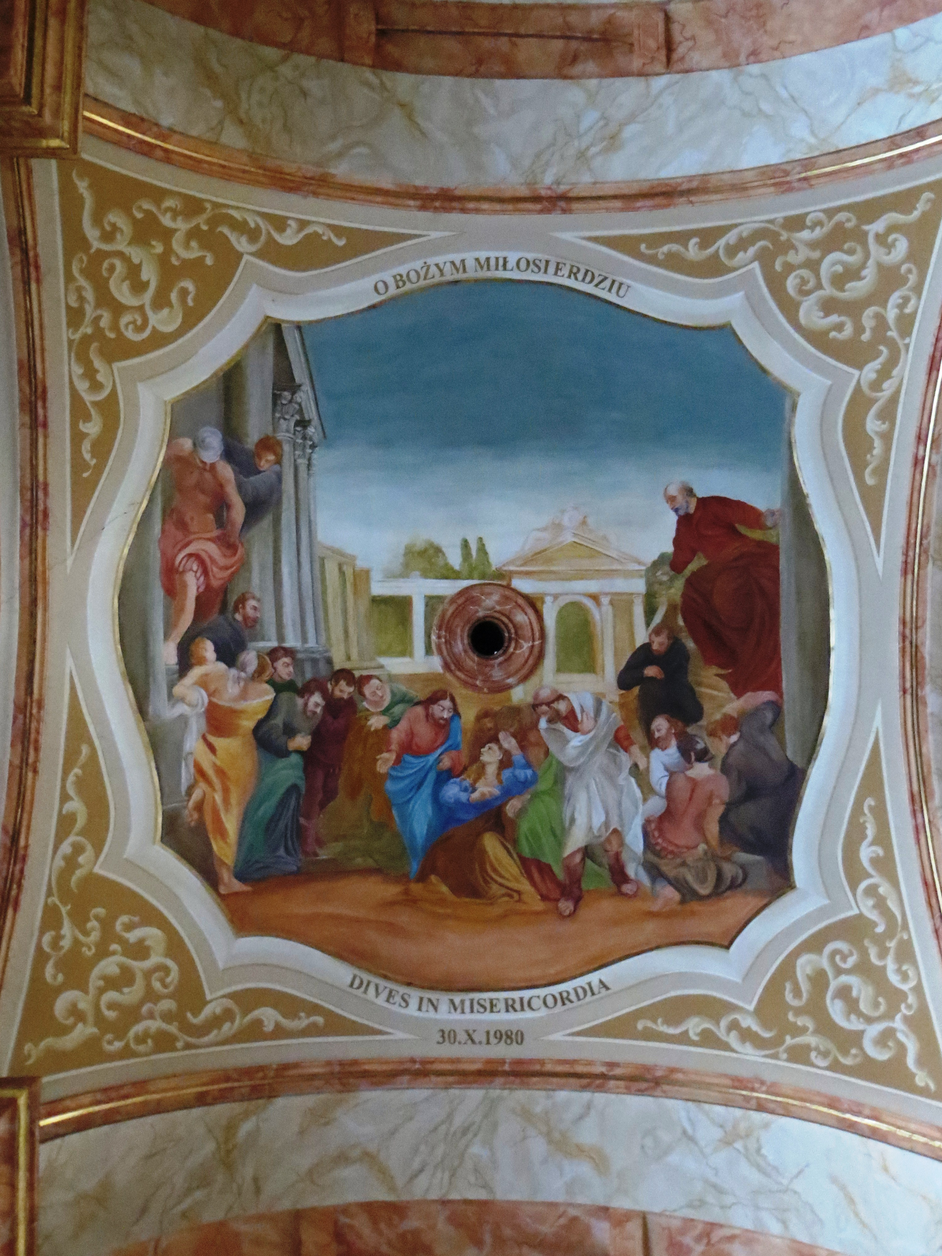 Malowidła na suficie w bazylice ONMP w Wadowicach.